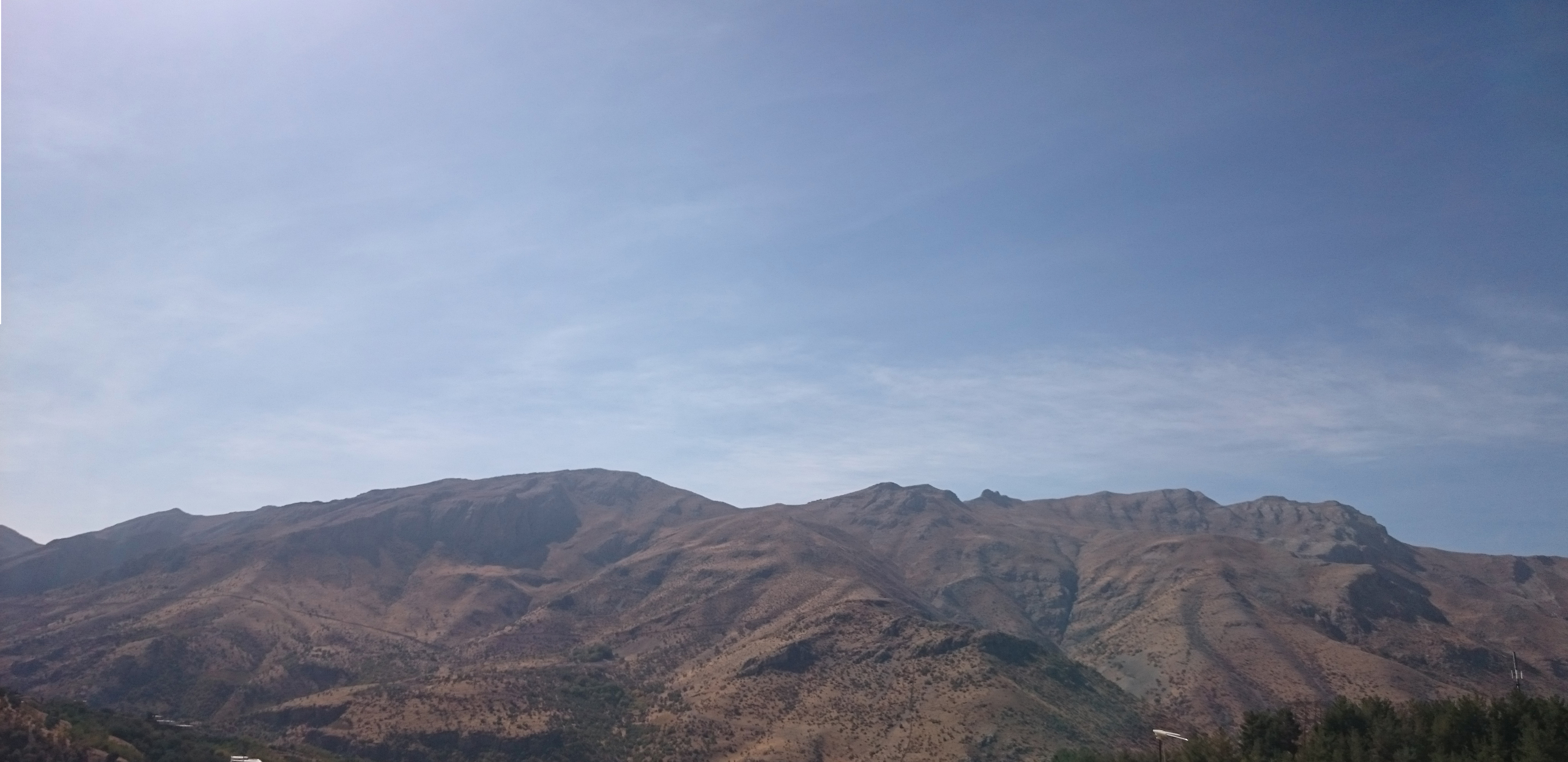 نمایی از کوه آتشکاه در جنوب شهر پاوه (گرفته‌شده از شهر پاوه) کوردی: وێنەیێک لە چیای ئاتەژگە لە باشووری شاری پاوە (گیراو لە شاری پاوە)